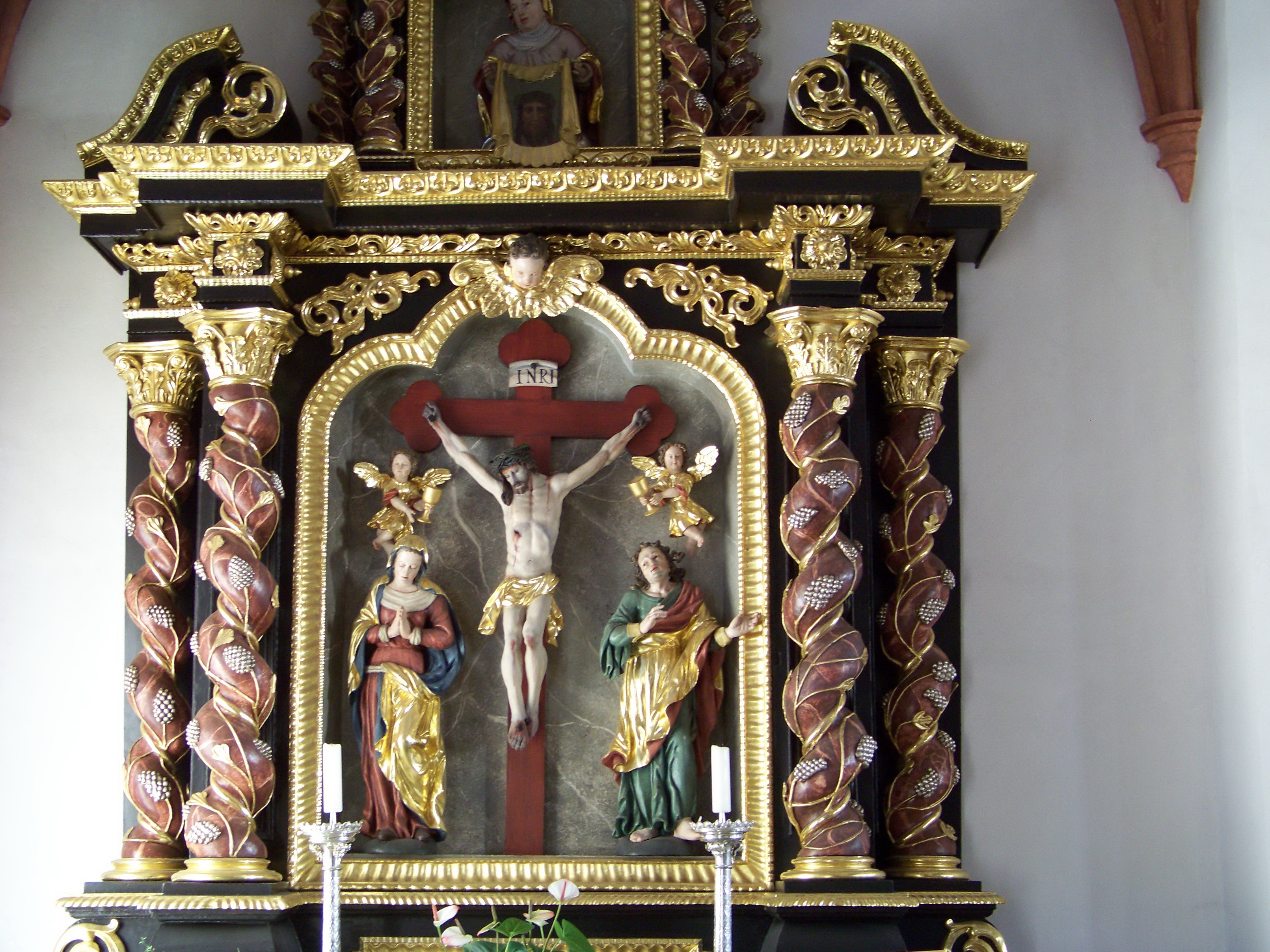 Obersüßbach, Kirchgasse 7, Katholische Pfarrkirche St. Jakobus der Ältere. im Kern romanische Chorturmanlage, spätgotisch verändert, 1877/80 neugotisch erweitert durch Verlängerung nach Westen und Anbau der Seitenschiffe. Kreuzaltar im nördlichen Seitenschiff mit zwei gewundenen Säulenpaaren mit Traubengirlanden. Im Auszug Darstellung der Veronika mit dem Schweißtuch, das das Antlitz Jesu zeigt.